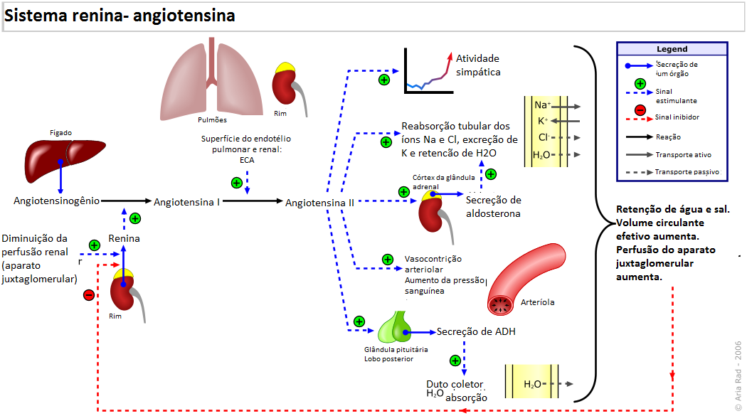 Sistema renina angiotensina angiosterona